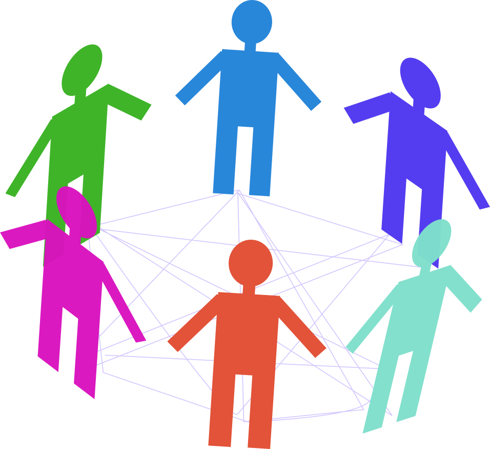 Gráfico comunicação face a face